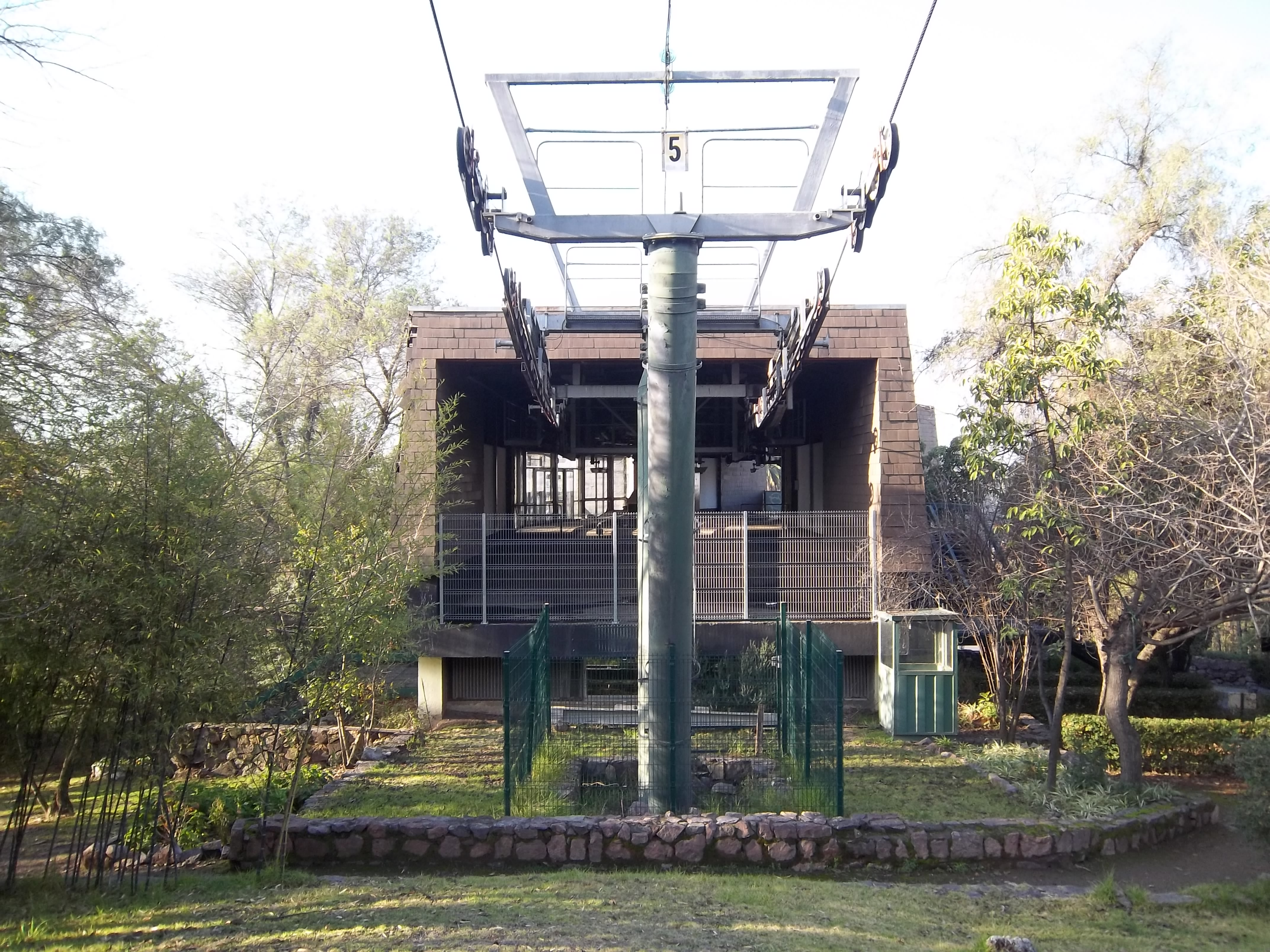 Estación intermedia Tupahue del teleférico del Cerro San Cristóbal, en Santiago de Chile, Región Metropolitana, Chile.